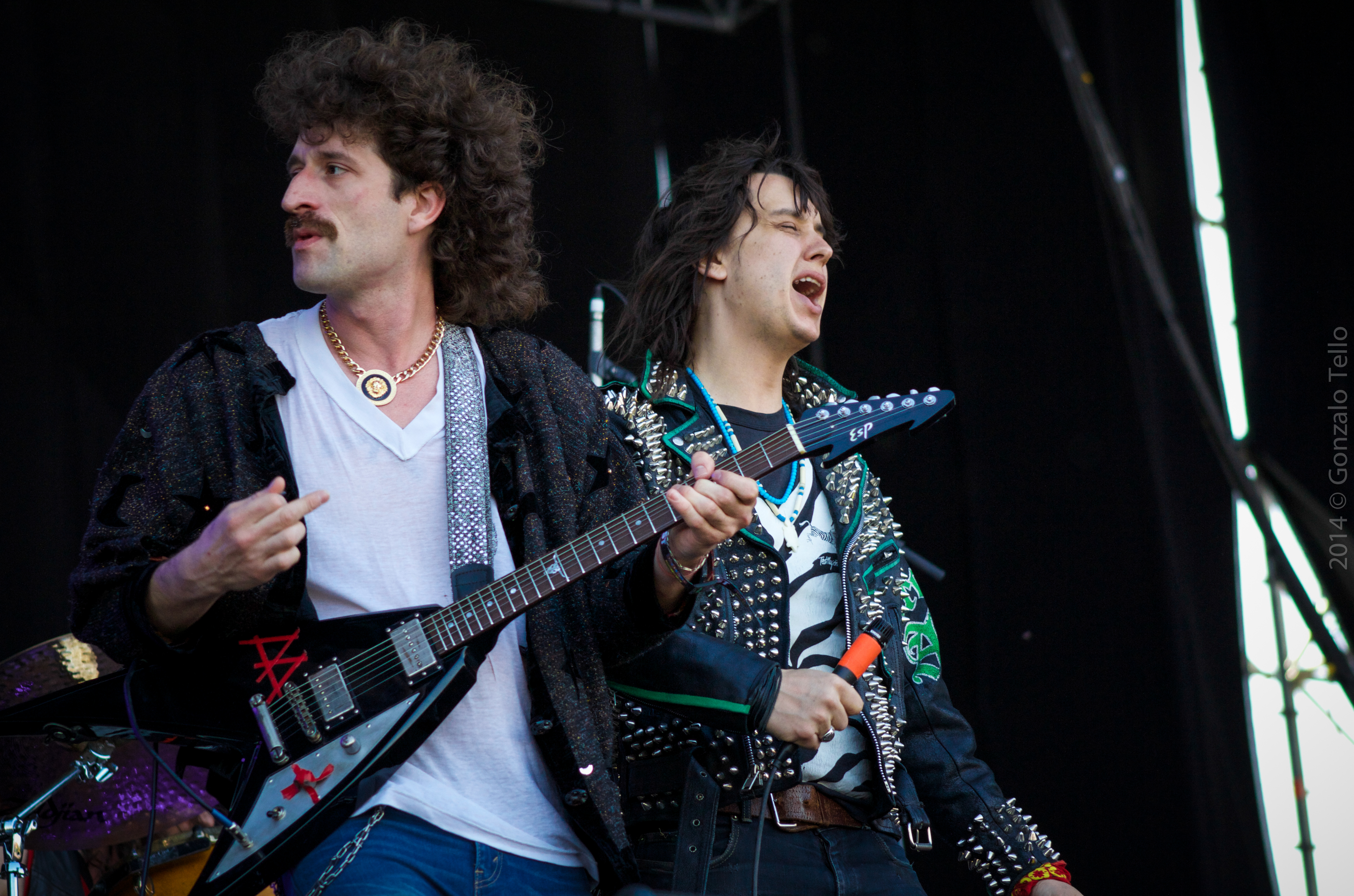 Foto: Gonzalo Tello